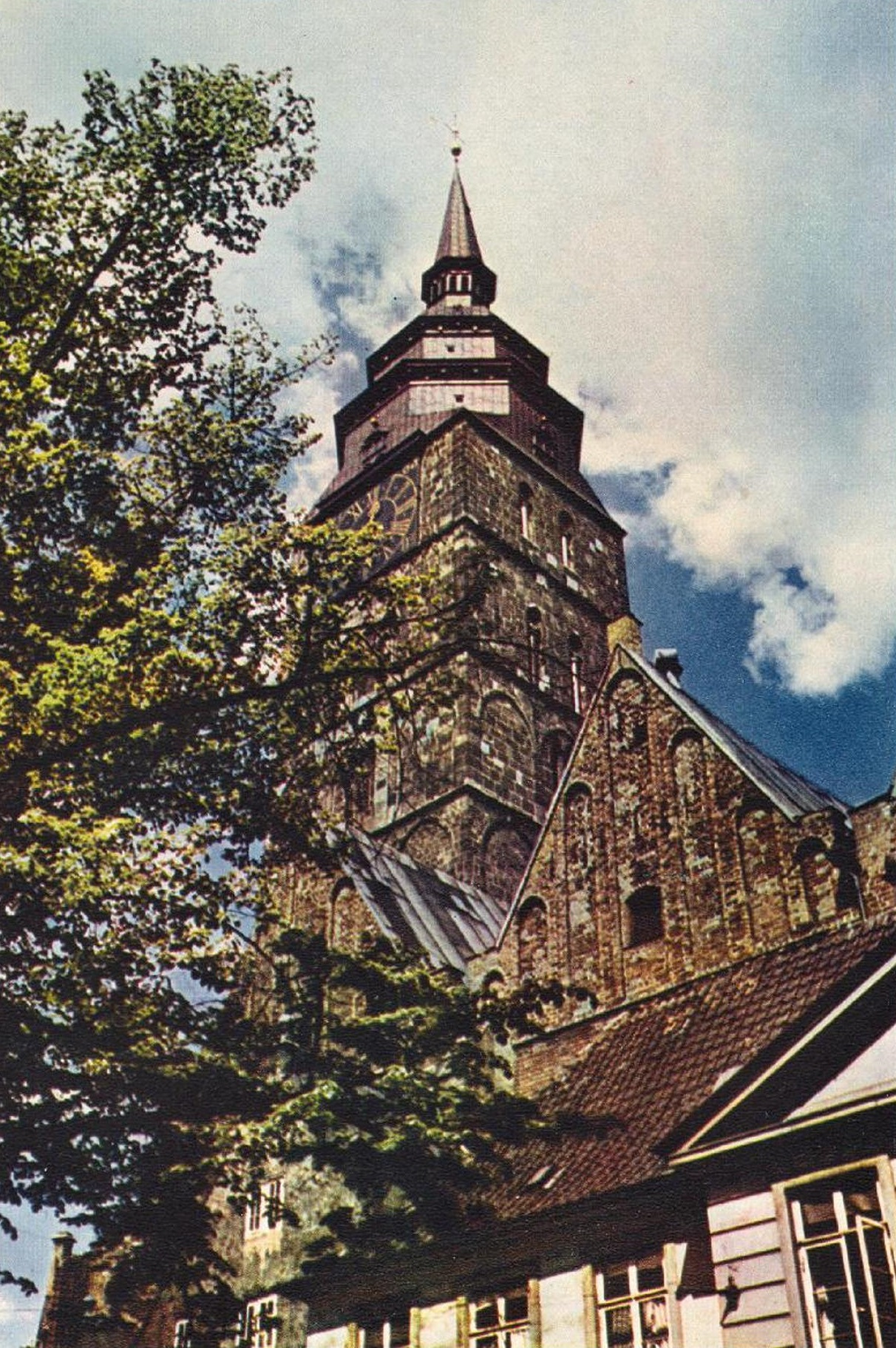 Farbfotografie von Turm, Dach, Giebeln und eines Teils der an der Südseite der Kirche angebauten Häuser. Das Dachkupfer von Turm und Kirchenschiff ist noch nicht patieniert, wodurch die Aufnahme in die zweite Hälfte der 1930er Jahre zu datieren ist, da das Dach kurz vor 1939 erst erneuert worden war.